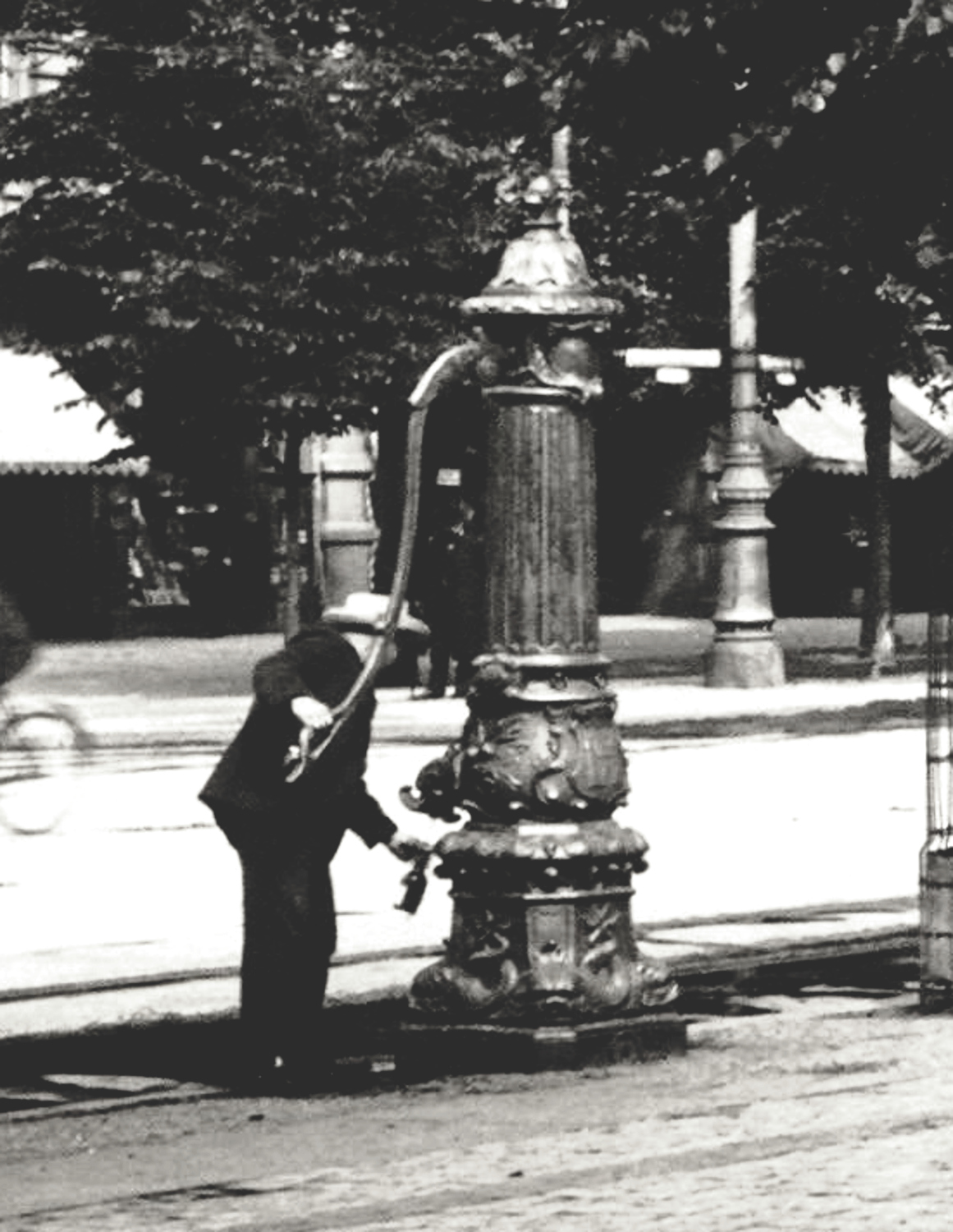 Der Straßenbrunnen der Eisengießerei Lauchhammer mit Charlottenburger Wappen ist ein Ausschnitt aus dem Foto von Max Missmann (Fotograf 1874-1945): Berliner Straße. Blick vom Wilhelmplatz zum Rathaus Charlottenburg. aus dem Jahr 1907 (Inventarnummer: IV 64/3350 Va. Der Standort des Straßenbrunnens liegt an der Südseite der Berliner Straße gegenüber vom Rathaus Charlottenburg mittig zur Spreestraße am Wilhelmplatz, auf dem sich beide Sgtraßen kreuzten. Ein ergänzendes Bild unter besitzt die Inventar-Nummer IV 64/3356 V: Berliner Straße mit Blick in die Spreestraße von Max Missmann aus dem Jahr 1907.